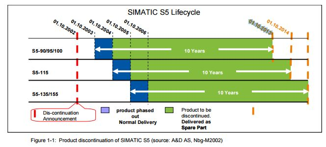 S5 satış döngü